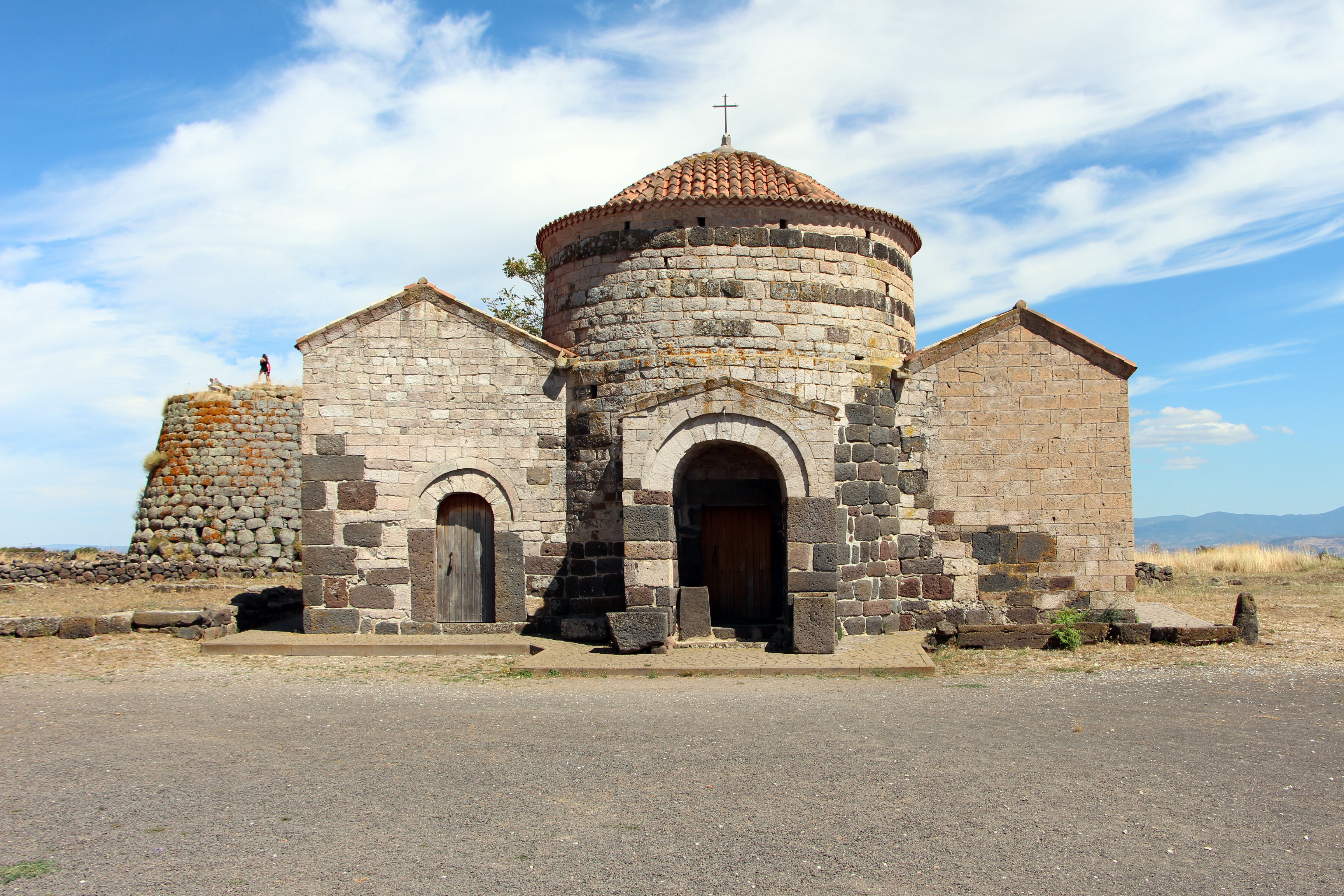 Macomer